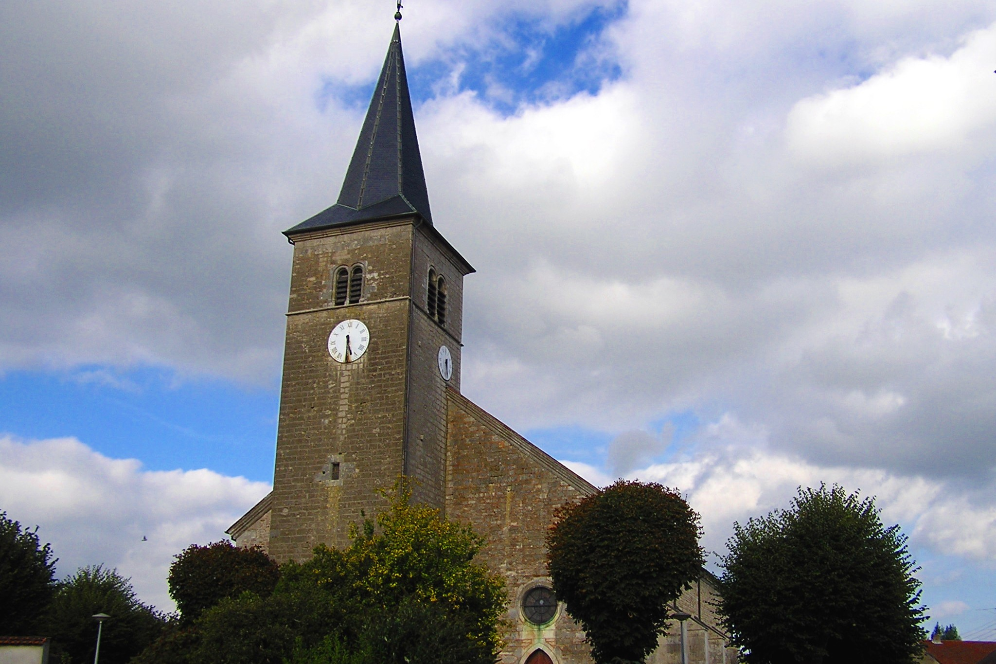 eglise de Liffol-le-Grand (Vosges)